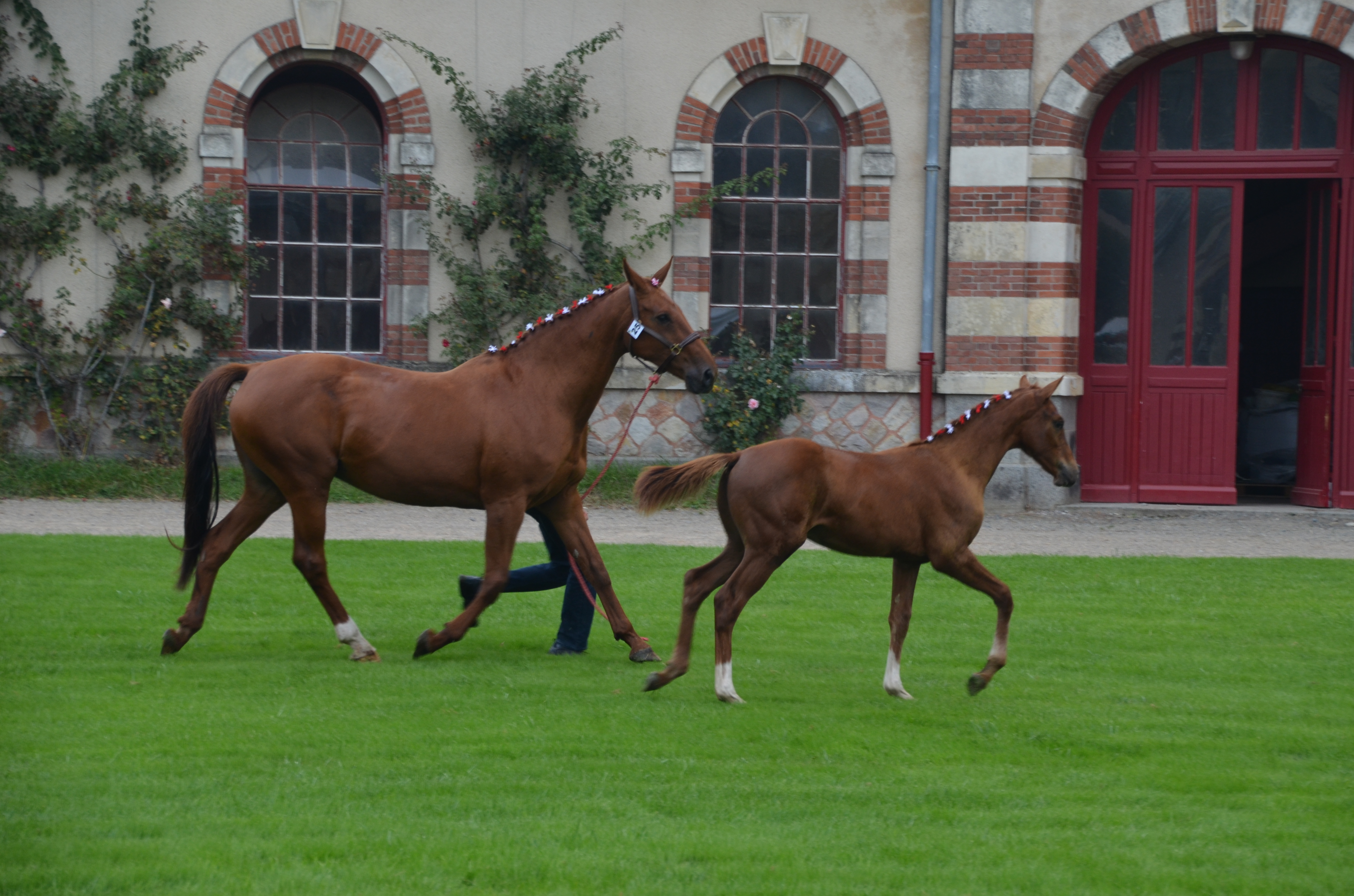 Foire aux foals